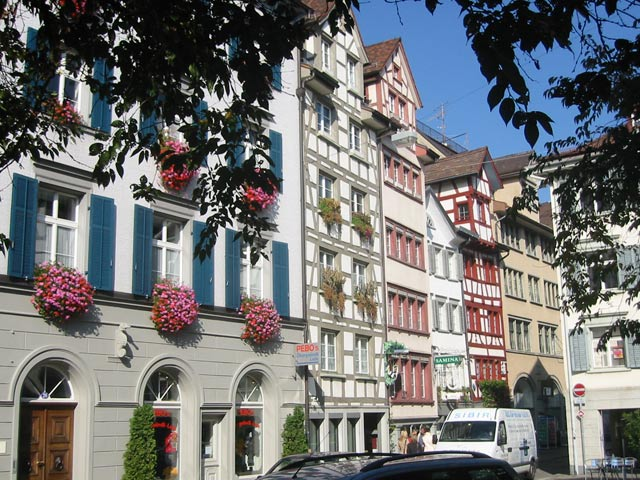 Bild:StGallenAltstadt.jpg Vieille ville de Saint-Gall Altstadt St. Gallen; selbstfotografiert 17.10.2003; Public Domain